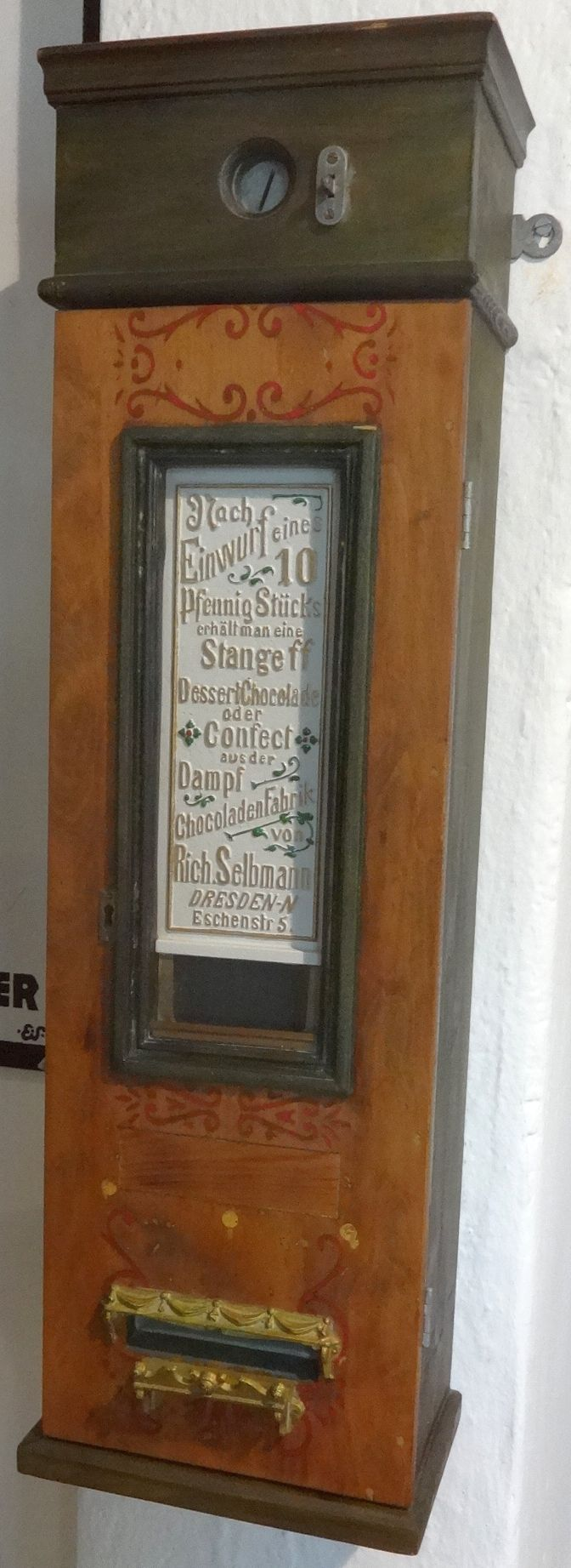 Schokoladen-Automat der Richard Selbmann Schokoladen, Kakao-, Marzipan-, Zuckerwaren-, Dragee- und Honigkuchen-Fabrik Dresden Dresden im Kreismuseum Finsterwalde